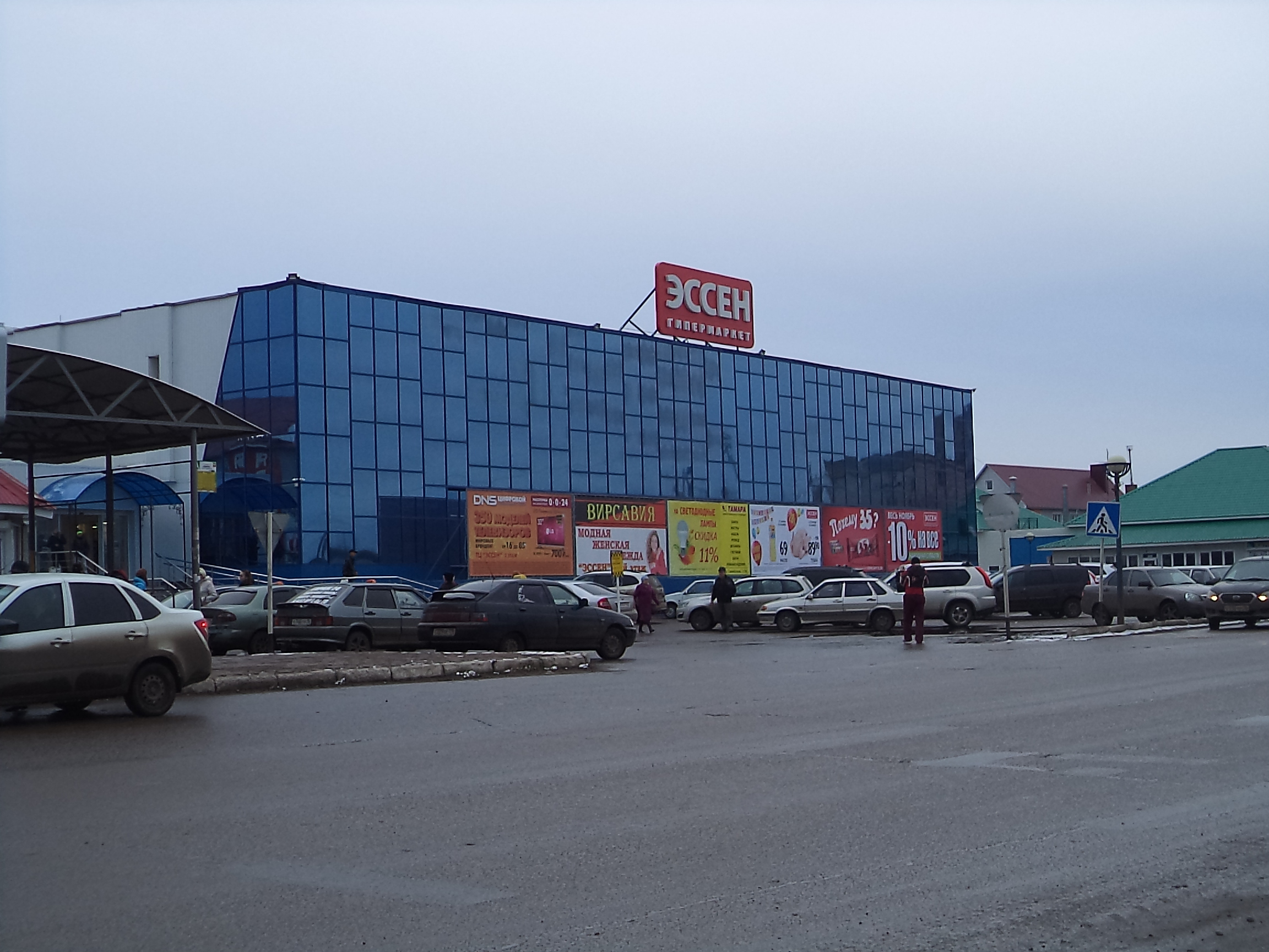 Эссен